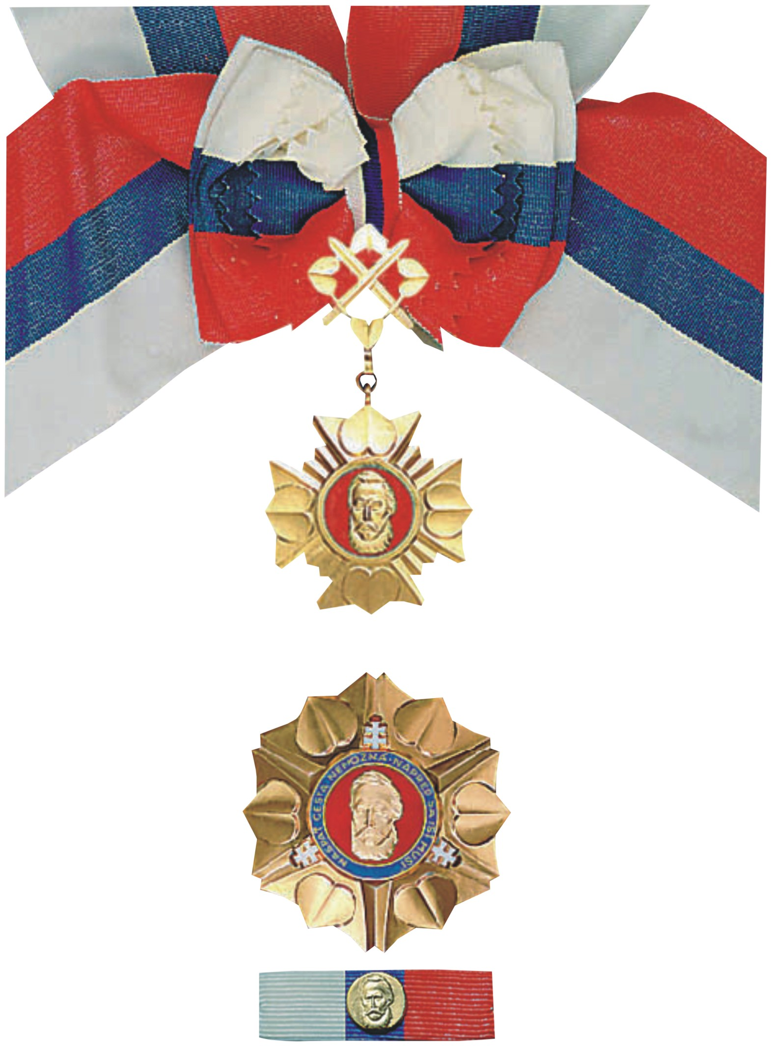 Insígnie vojenského druhu I. triedy radu tvorí: radový kríž, veľká radová stuha, radová hviezda, radová stužka a radová rozeta. Radový kríž má priemer 65 mm, je razený zo striebra, pozlátený. Kríž vojenského druhu má záves tvorený štyrmi plastickými lipovými listami usporiadanými po obvode modro smaltovaného kruhu, v strede s dvoma prekríženými mečmi. Veľká radová stuha je hodvábna, bielo-modro-červená, s pomerom farieb 3/8:2/8:3/8, dlhá 180 cm, široká 90 mm. Veľká radová stuha sa nosí cez pravé plece k ľavému boku. V mieste, kde sa jej konce križujú na ľavom boku, je pripevnená dvojitá ozdobná mašľa. Radová hviezda má priemer 90 mm, je razená zo striebra, pozlátená. Hviezdu tvorí šesťramenná hviezdica, ktorej ramená sa od stredu rozširujú.